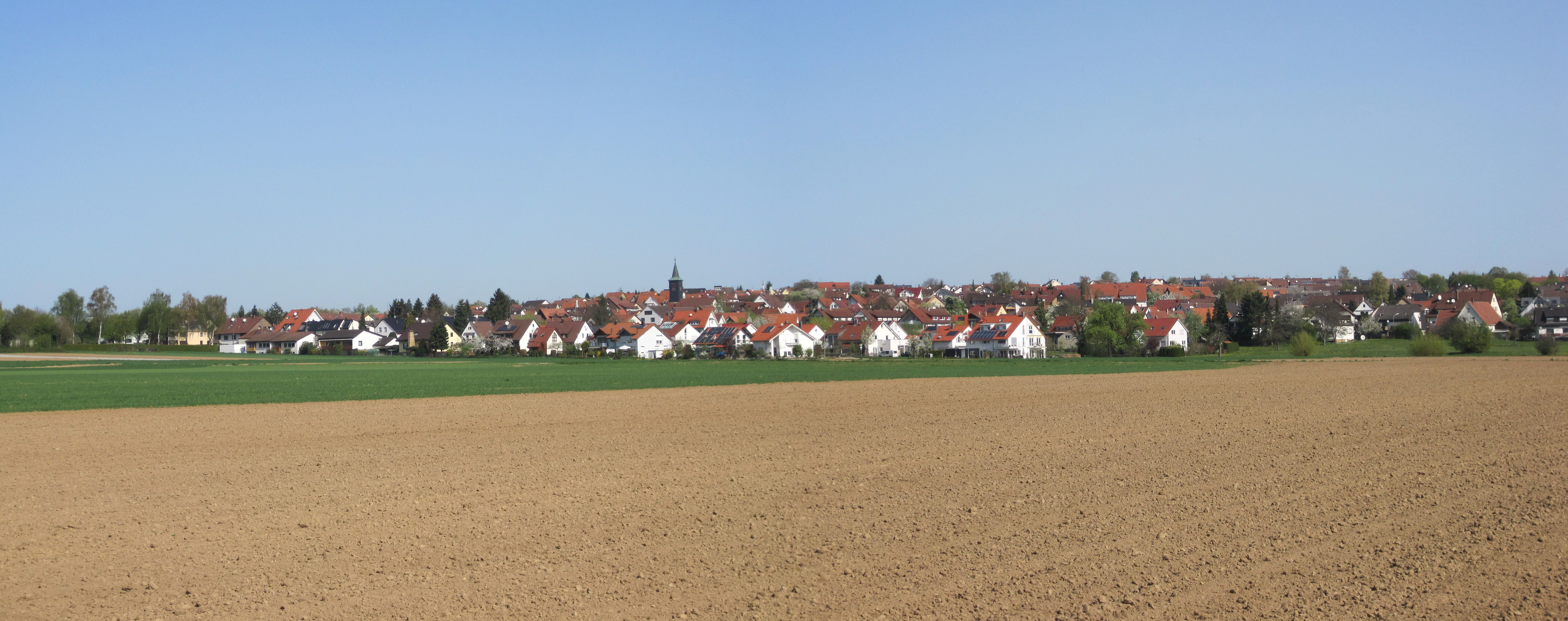 Ansicht von Filderstadt-Harthausen, aus Richtung Grötzingen kommend